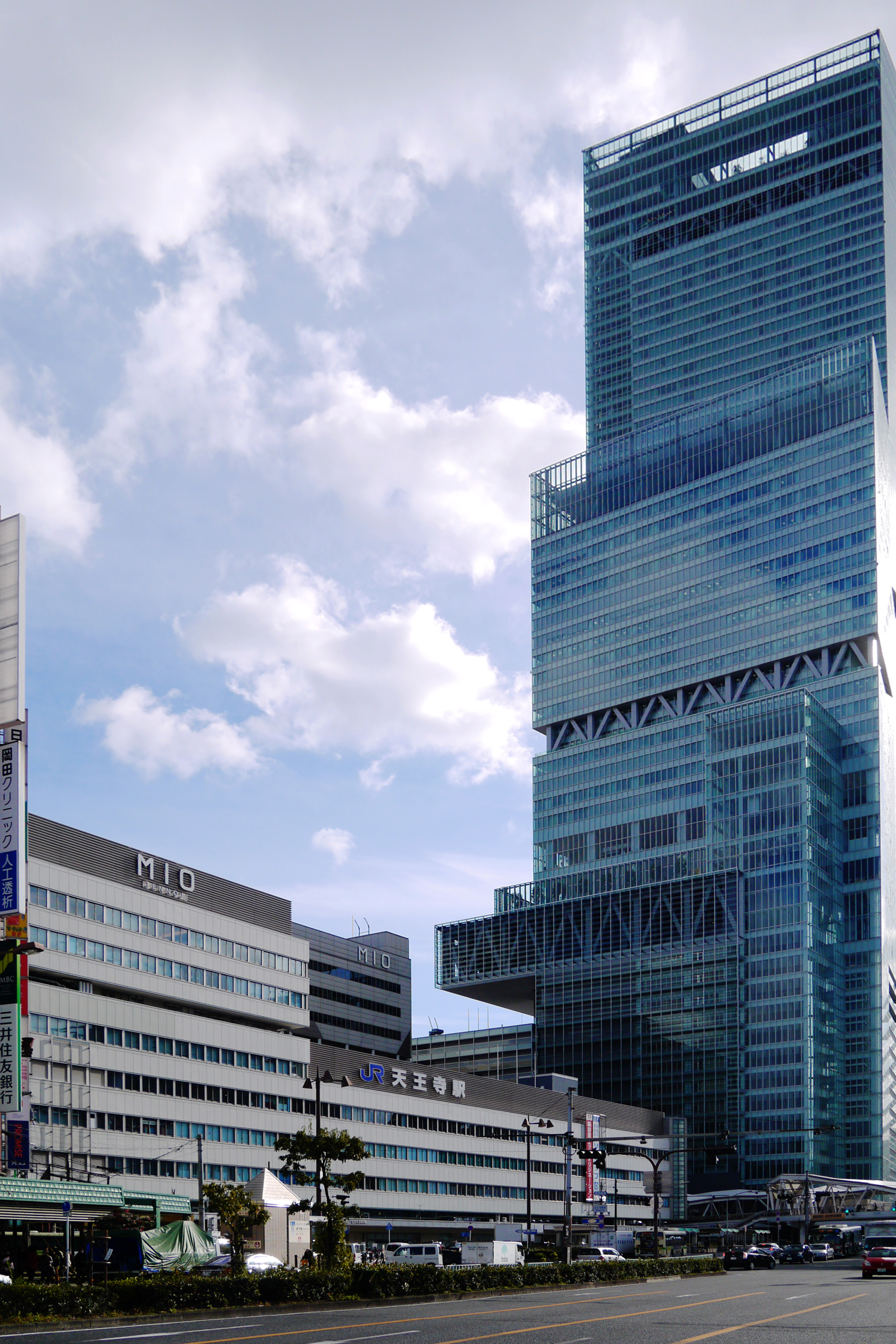 Tennoji Station (天王寺駅), Osaka, Osaka prefecture, Japan